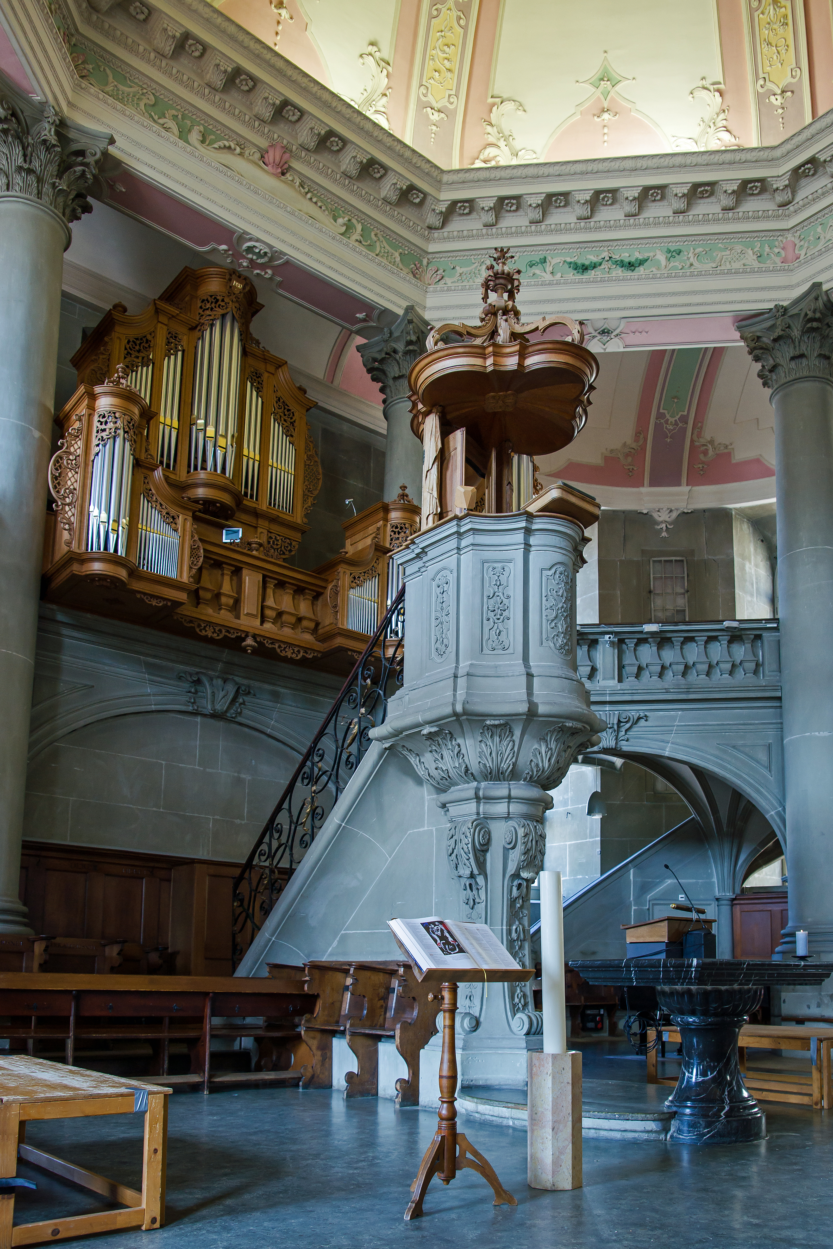 Kanzelaufbau vor der Orgel in den Raum hinein